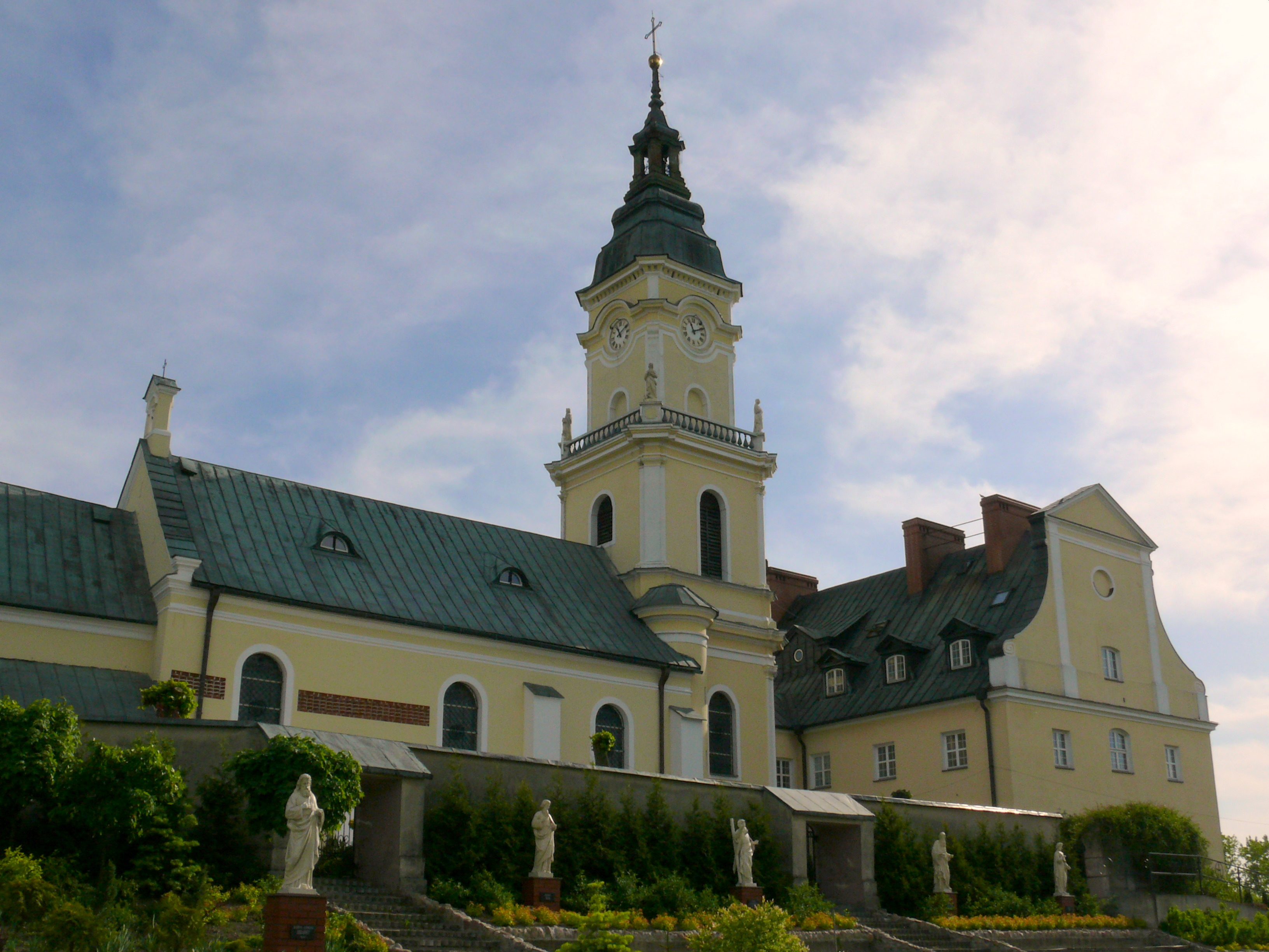 Kościół św.Wojciecha i klasztor Paulinów w Brdowie